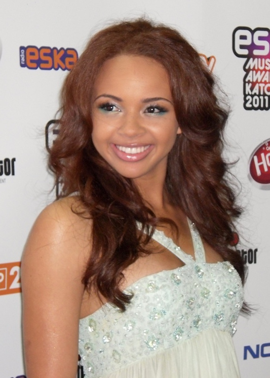 Alexis Jordan na Eska Music Awards 2011